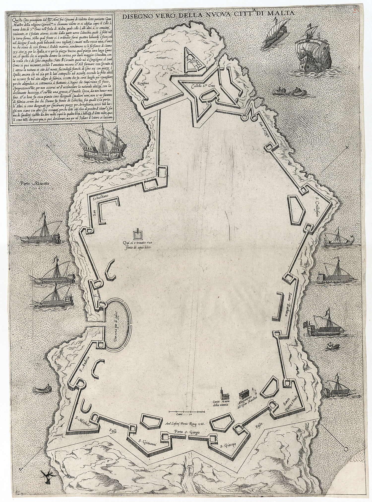 Disegno vero della nuova città di Malta (La Valetta); Kupferstich, um 1566